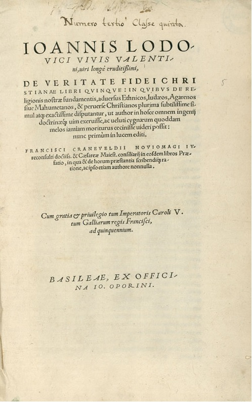 Portada de "De veritate fidei Christianae libri quinque" de Lluís Vives. Basileae (Basilea): Ex officina Ioannis Oporini, 1543